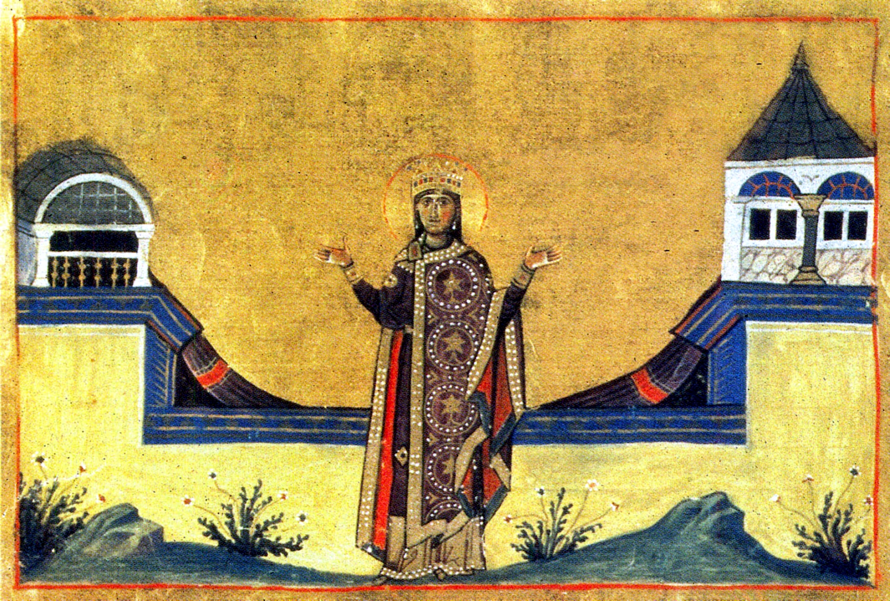 Η Αγία Θεοφανώ η βασίλισσα – 16 Δεκεμβρίου. Theophano Martiniake (wife of Leo VI the Wise)